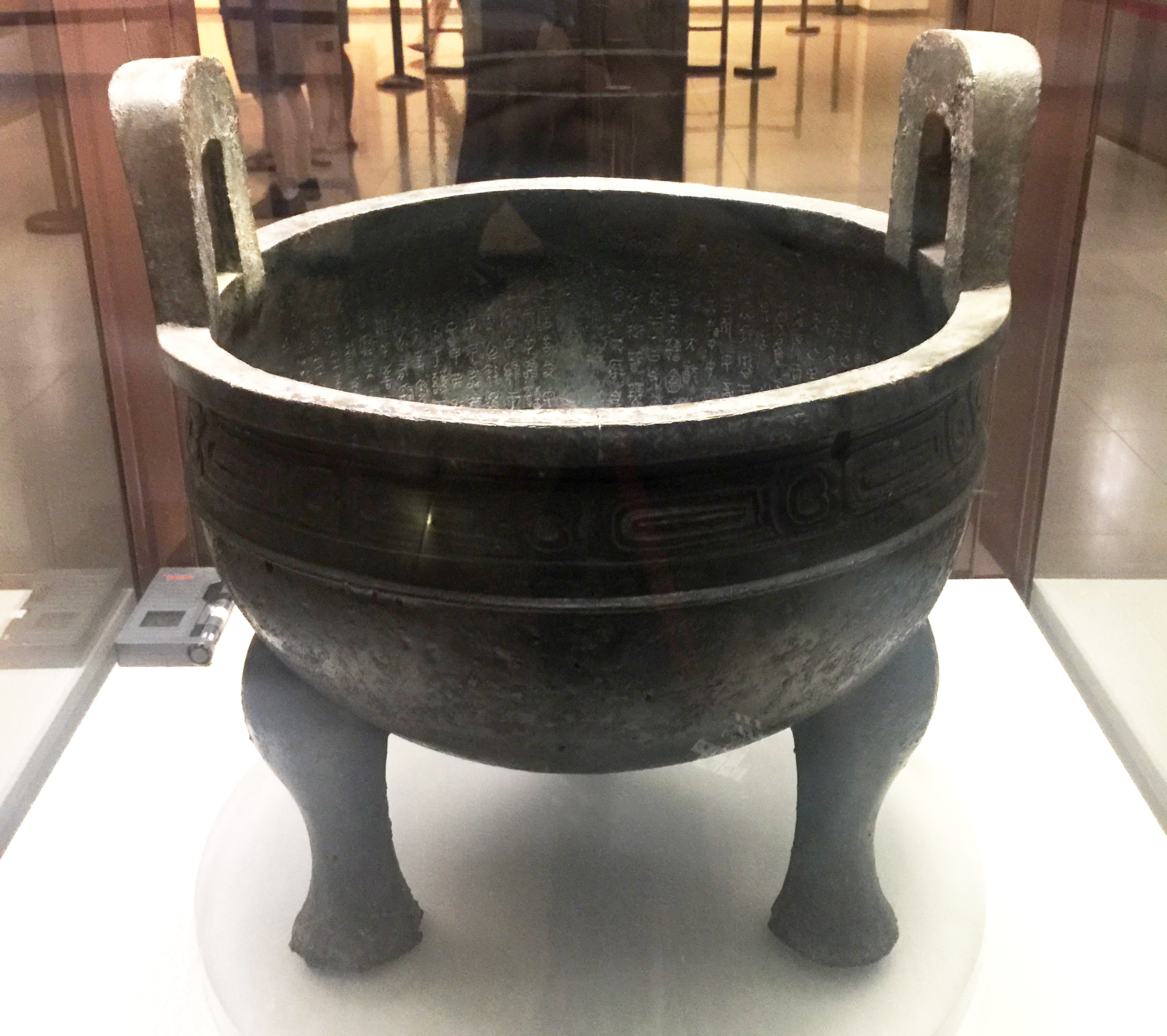 毛公鼎，西周时期，國立故宫博物院館藏。